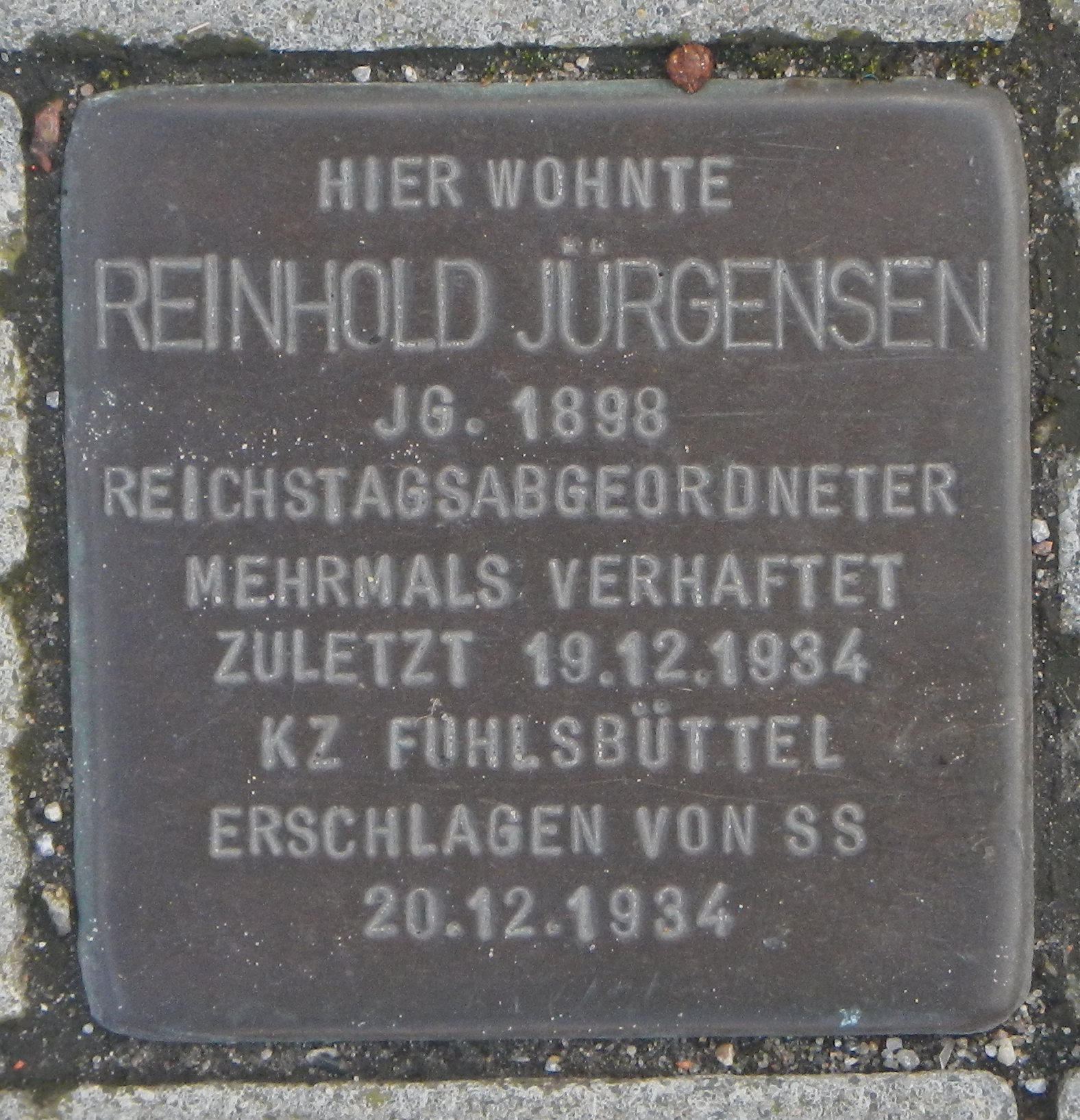 Aufgenommen auf dem Bürgersteig in der Morthorststraße 14, 25336 Elmshorn Inschrift: Hier wohnte Reinhold Jürgensen jg. 1898 Reichstagsabgeordneter mehrmals verhaftet zuletzt 19.12.1934 KZ Fuhlsbüttel Erschlagen von SS 20.12.1934